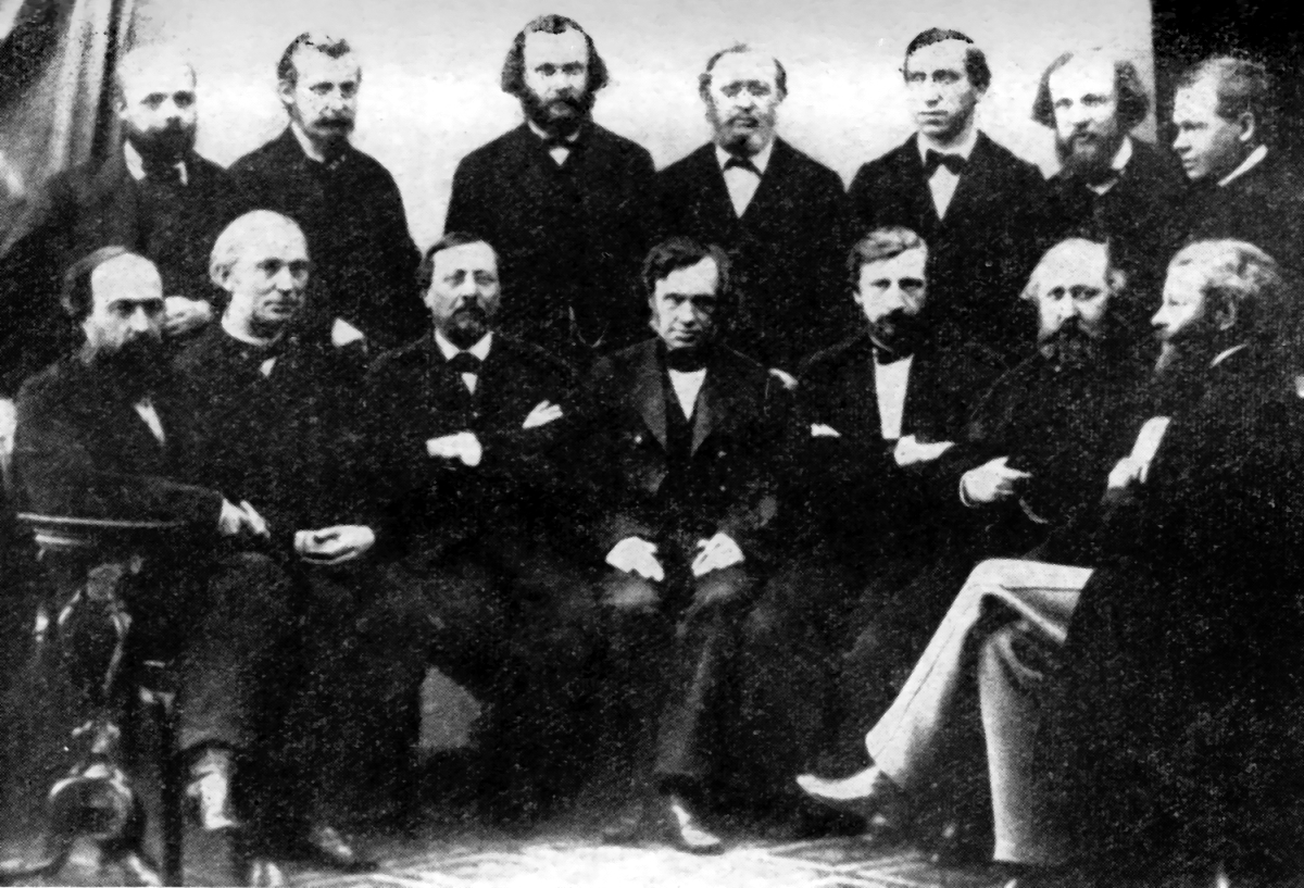 Группа профессоров Физико-математического факультета Санкт-Петербургского университета. Сидят слева направо: А. В. Советов, П. Л. Чебышев, К. Ф. Кесслер, С. Е. Савич, П. А., Пузыревский, А. Н. Бекетов, Ф. В. Овсянников. Стоят: Э. X. Ленц, Меншуткин, А. С. Фаминцын, И. И. Сомов, Ф. Ф. Петрушевский, Д. И. Менделеев, А. Н. Коркин.